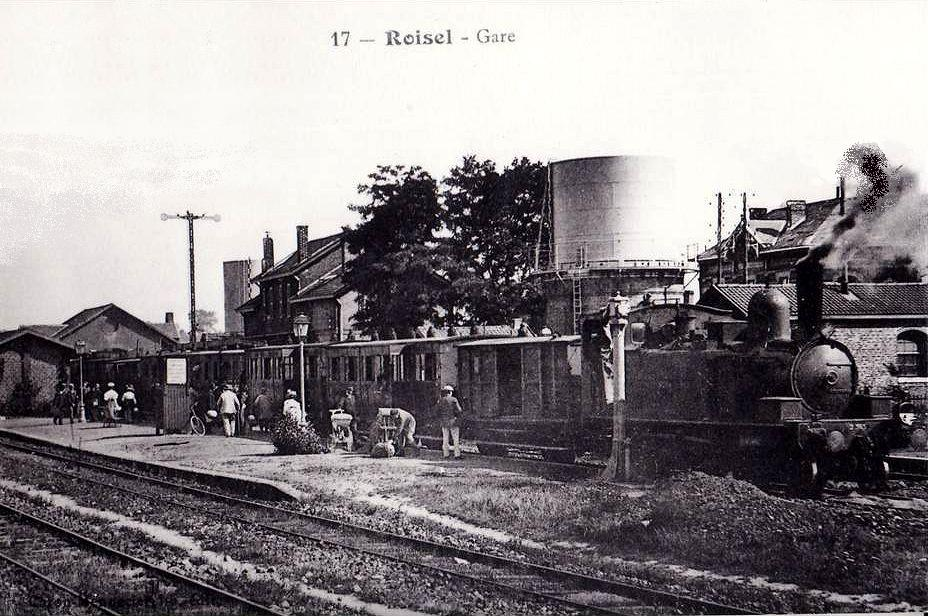 Train en gare de Roisel au début du XXe siècle. Le bâtiment-voyageurs a été entièrement détruit pendant la Première Guerre mondiale.